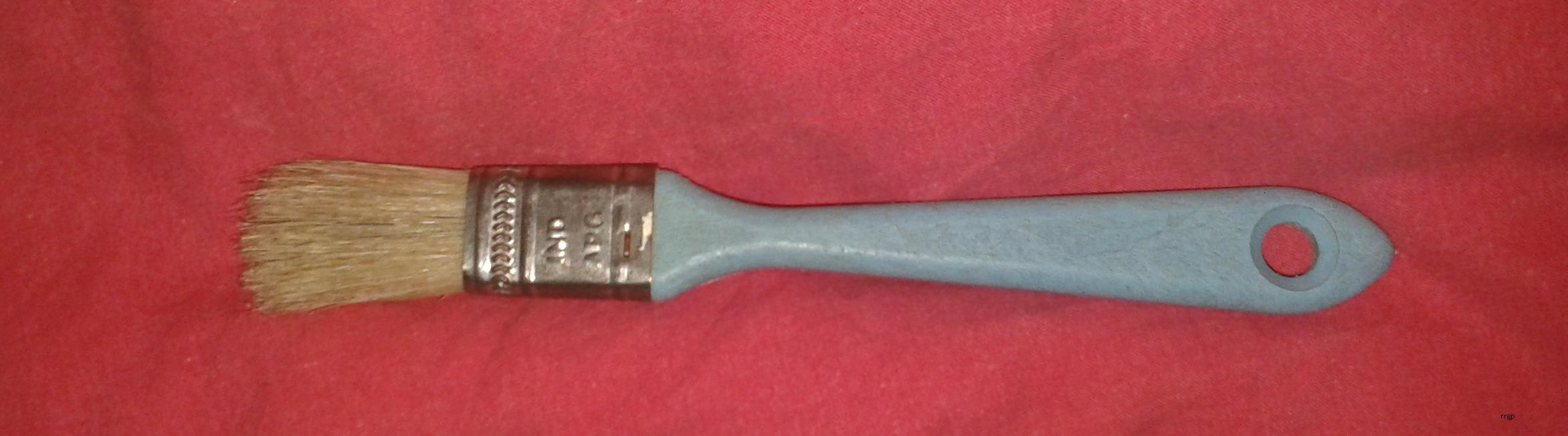 pincel